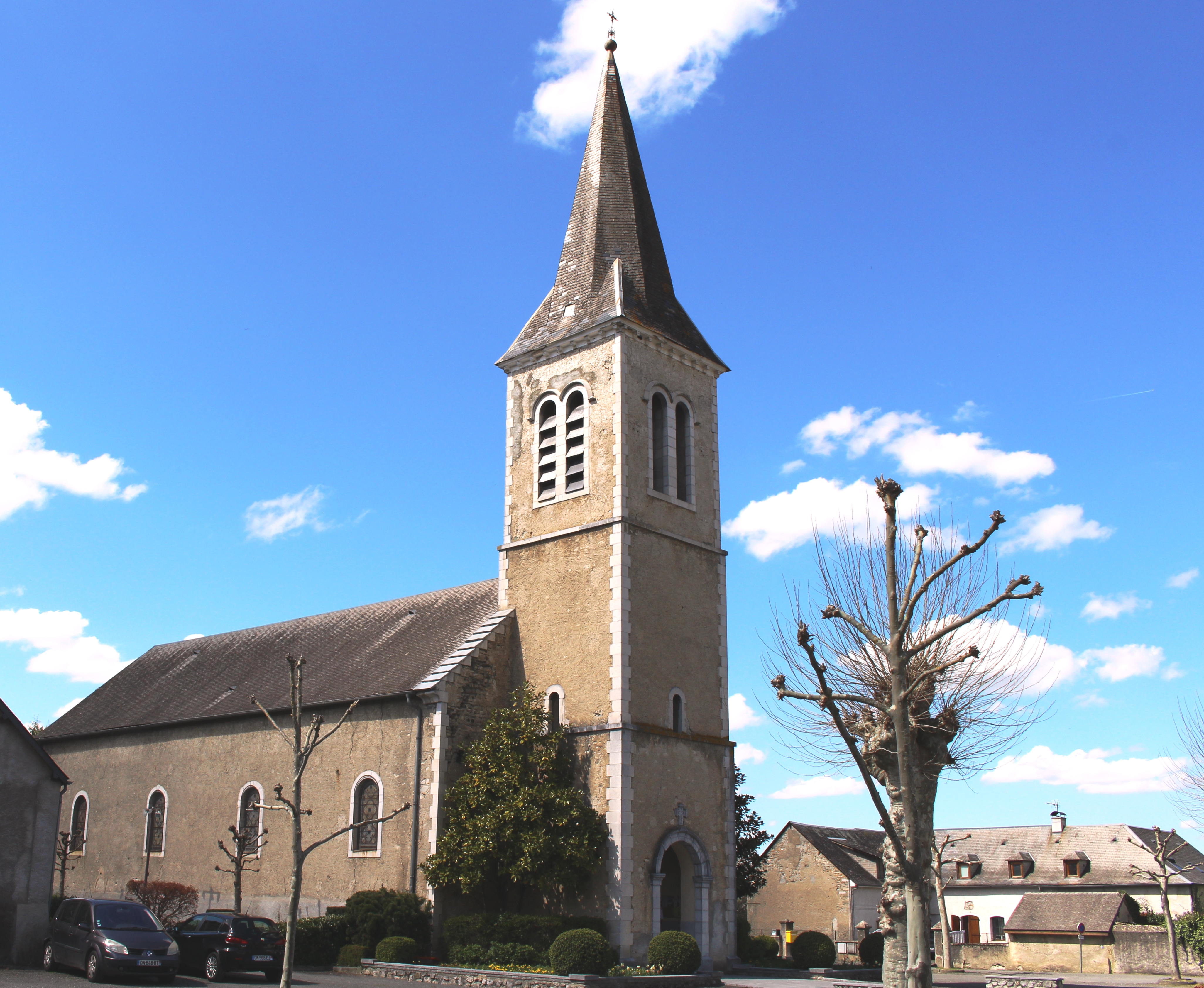 Église Saint-Georges d'Ordizan (Hautes-Pyrénées)